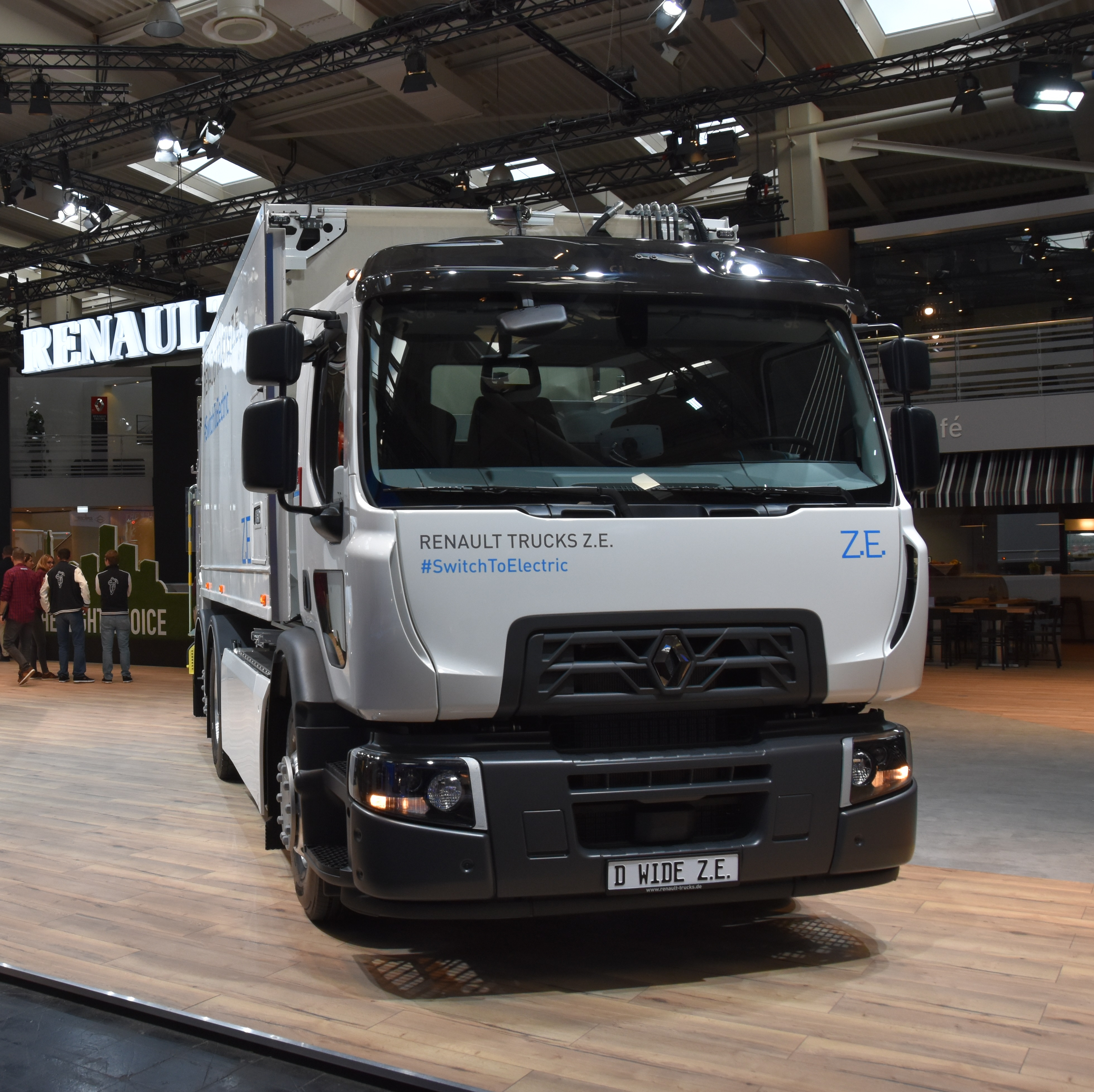 Baureihe Z.E. von Renault Trucks